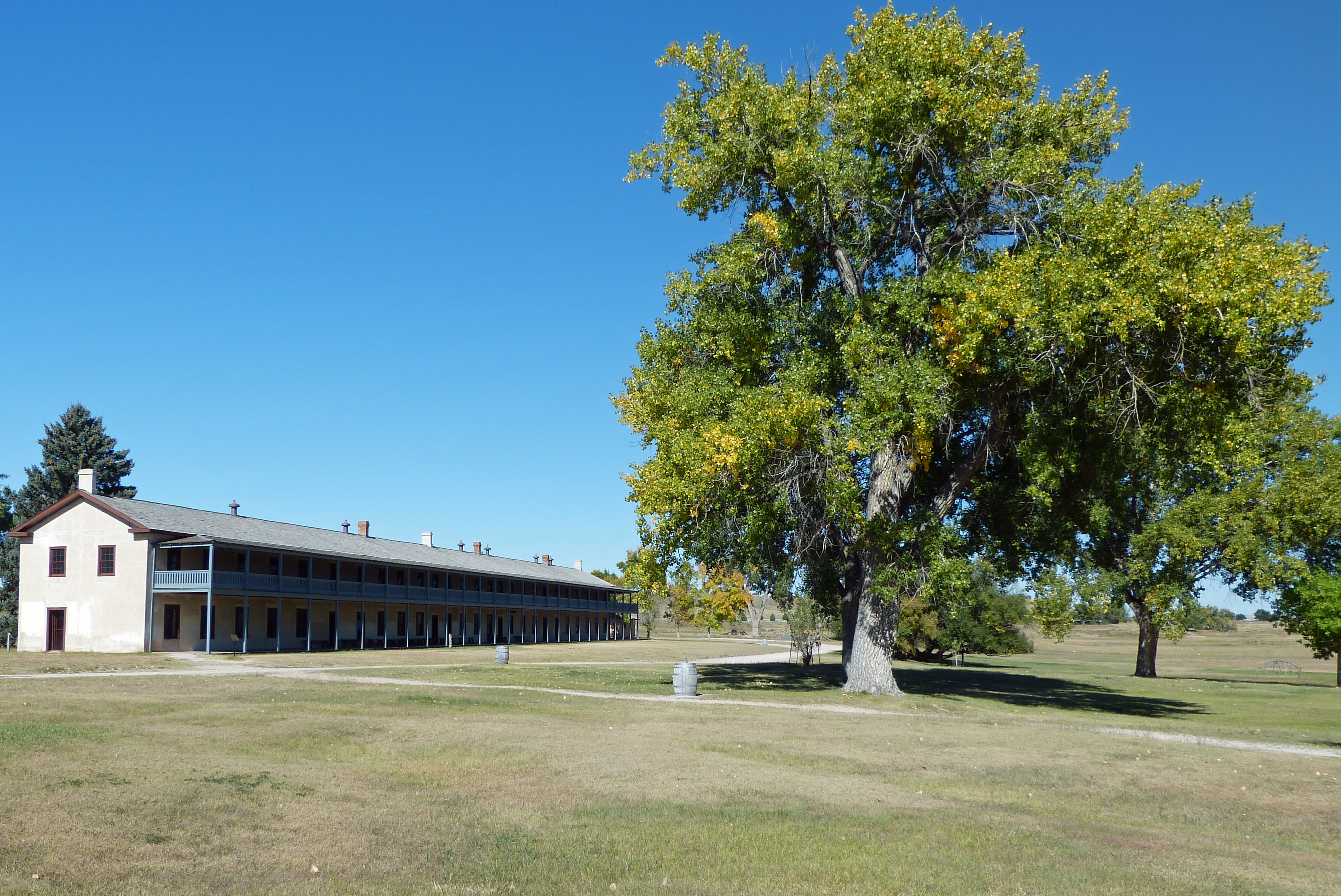 Kavallerie Baracken. Heute wieder vollständig restauriert und historisch ausgestattet.